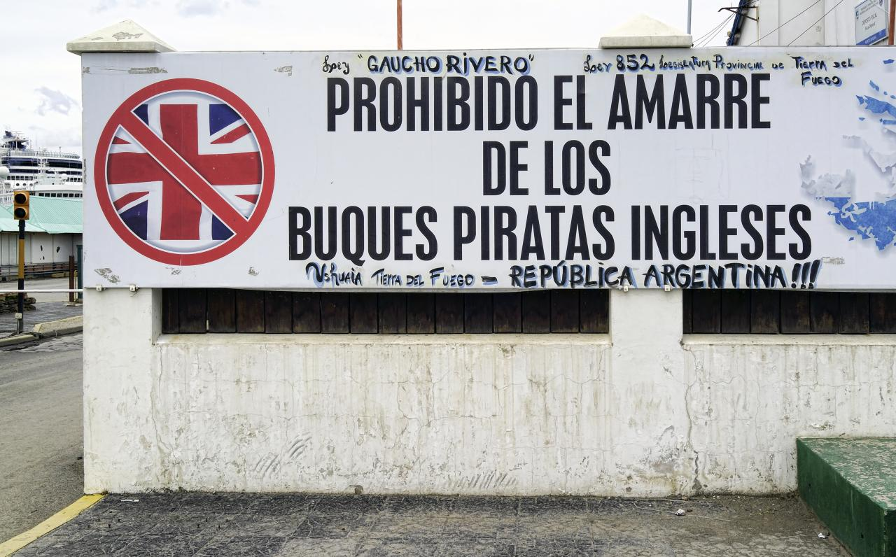 Grafiti propagandístico de Ushuaia alusivo a la Ley Gaucho Rivero, que impide el amarre de barcos con pabellón británico en los puertos de Argentina.